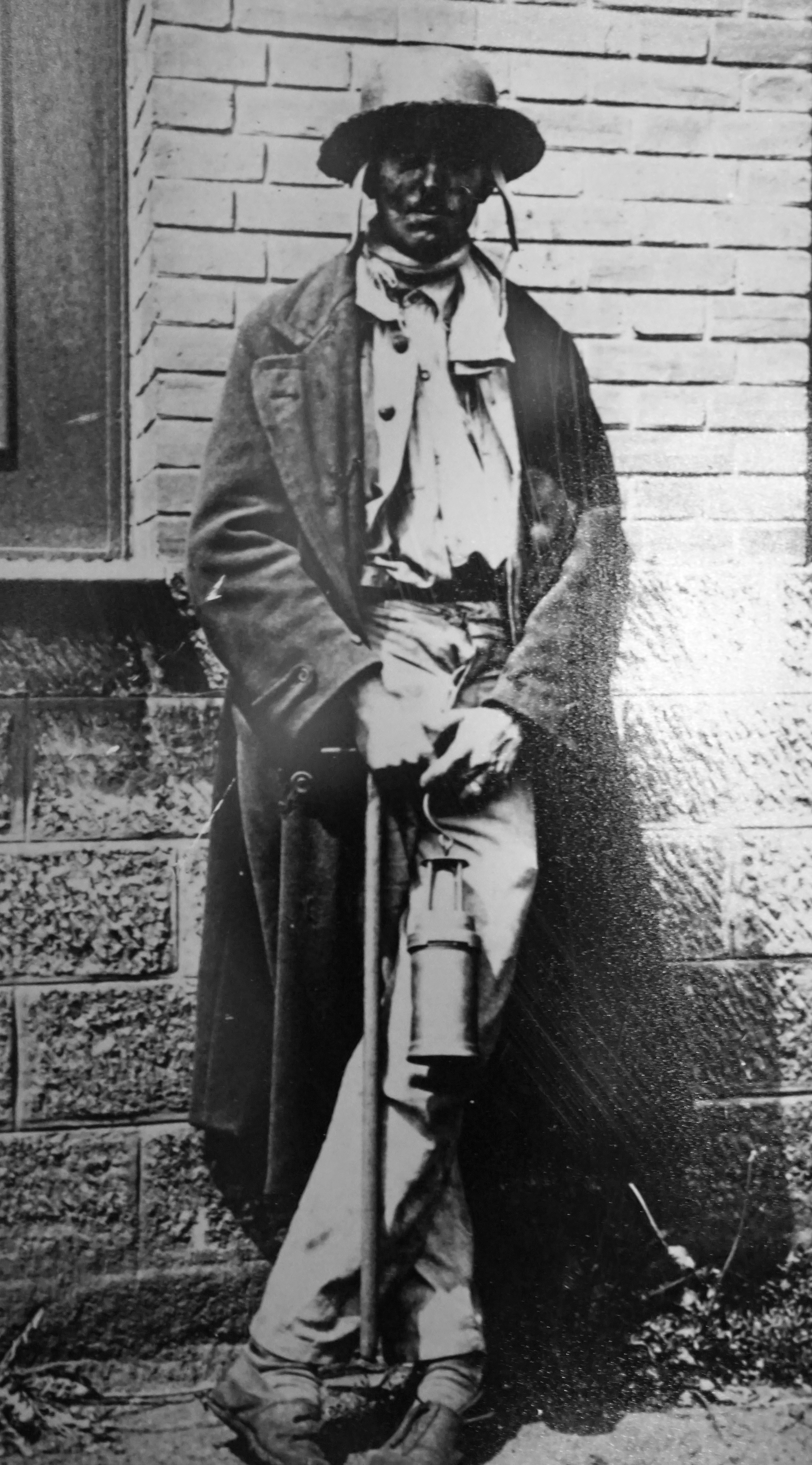 Armand Egerman, directeur du puits Arthur-de-Buyer de 1925 à 1945 puis ingénieur principal des Houillères de Ronchamp.